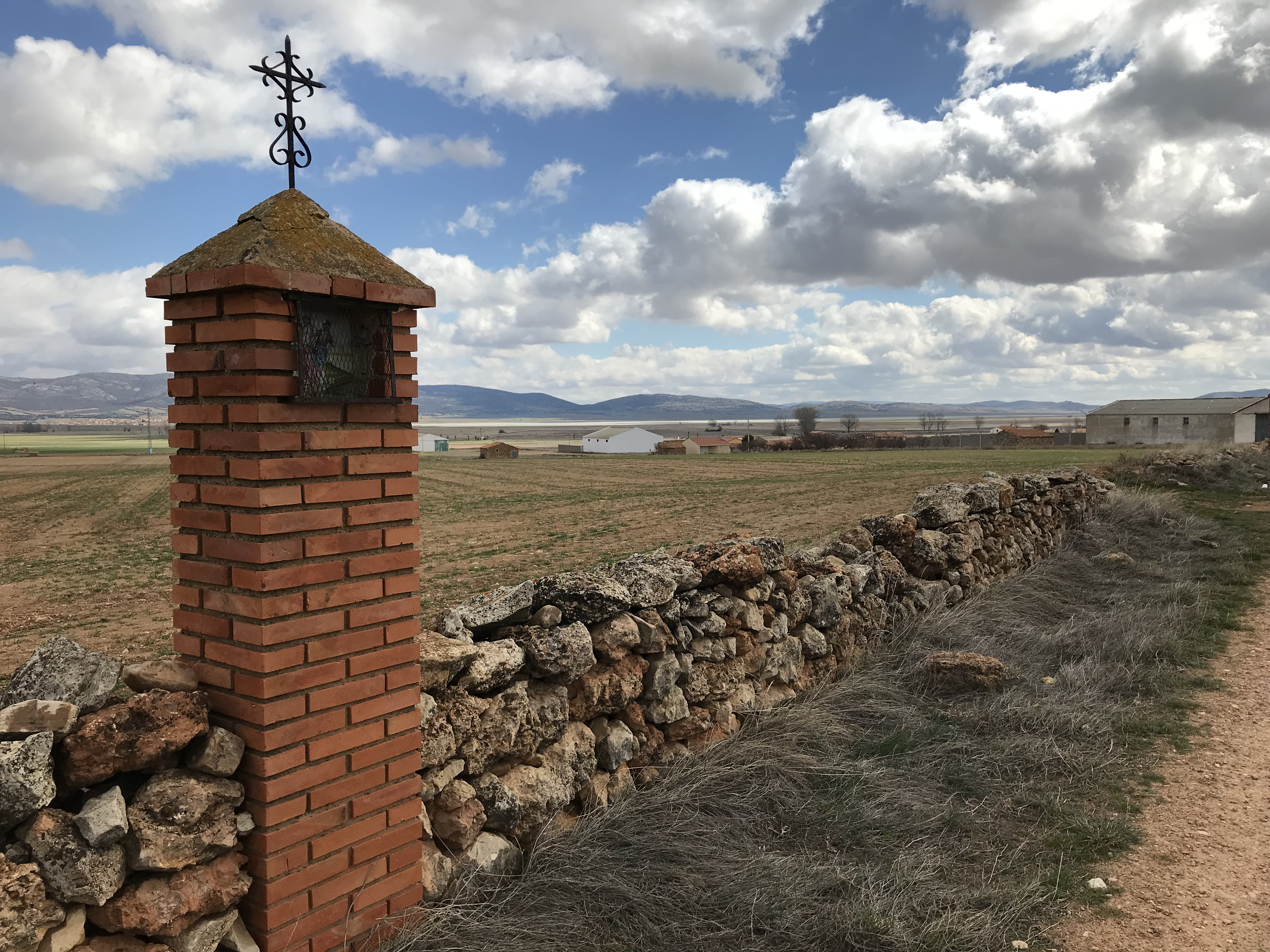 peiron